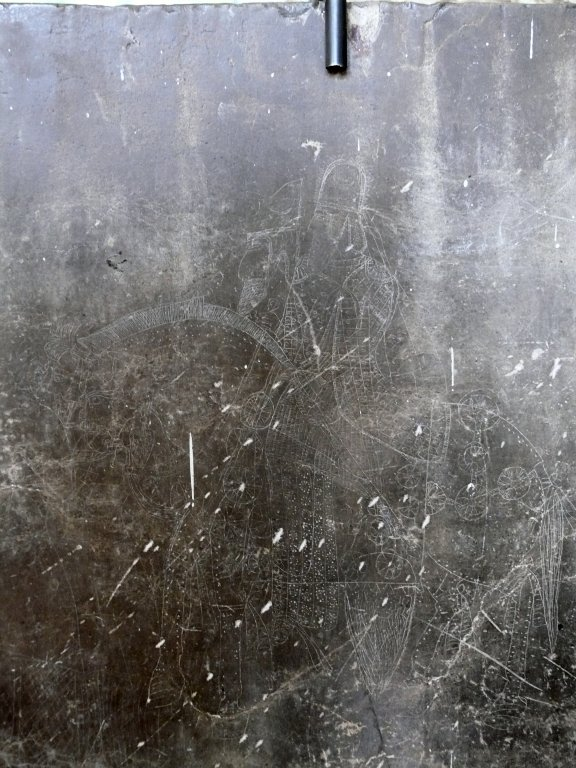 Horseman graffito, Sassanian era, Persepolis museum, Iran